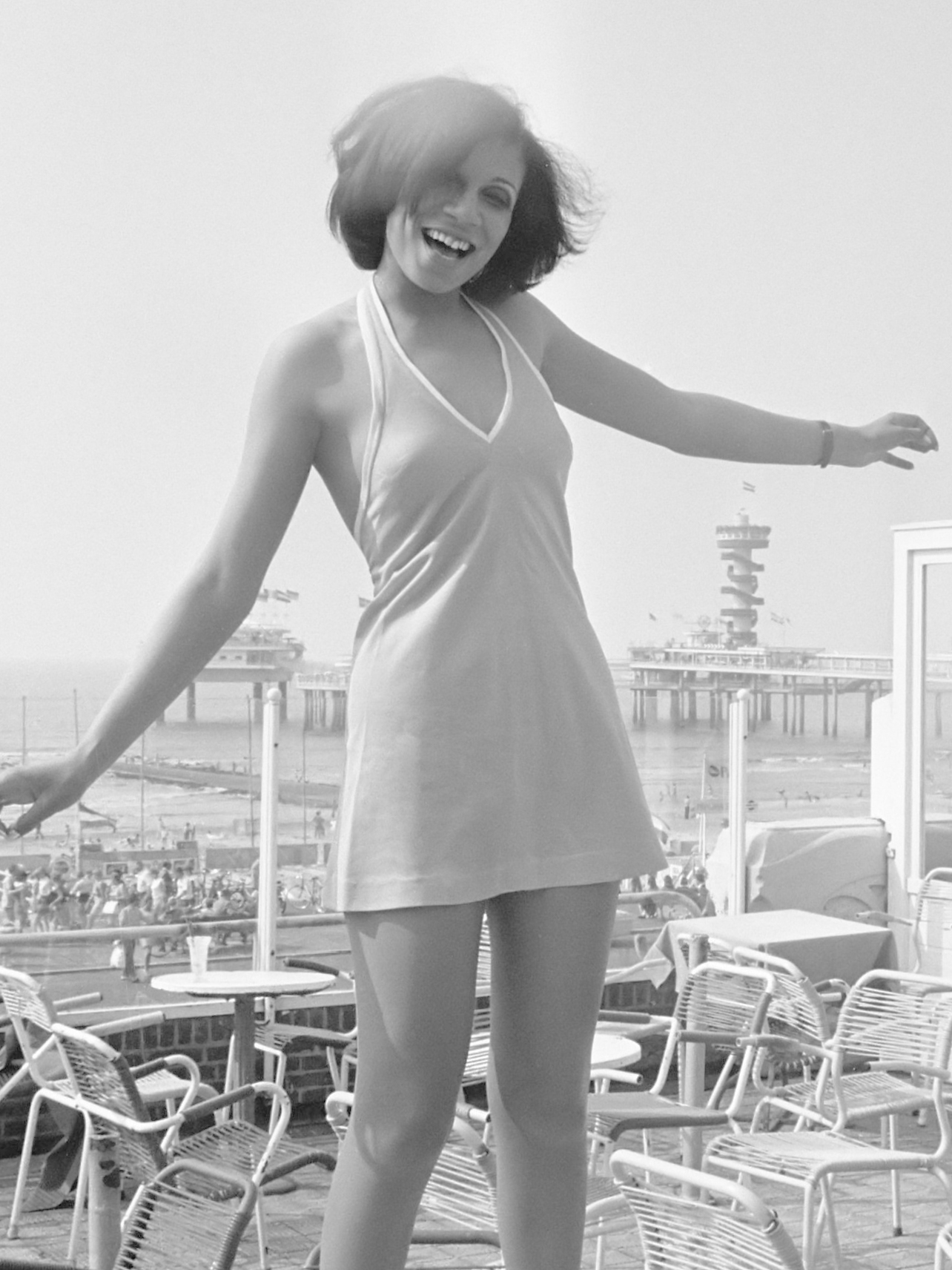 Singing Europe 1969 in Scheveningen. De vrolijke Maxine Nightingale uit Engeland op een terras 4 juli 1969